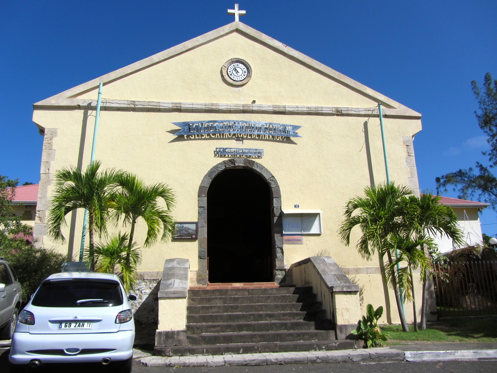 Eglise Catholique de Marigot